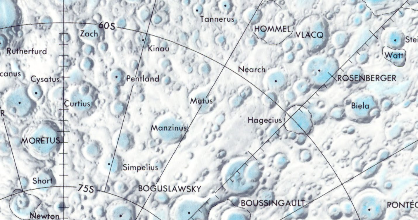 Cráter Rosenberger. Localización. (Lunar Chart LPC1. Second Edition)